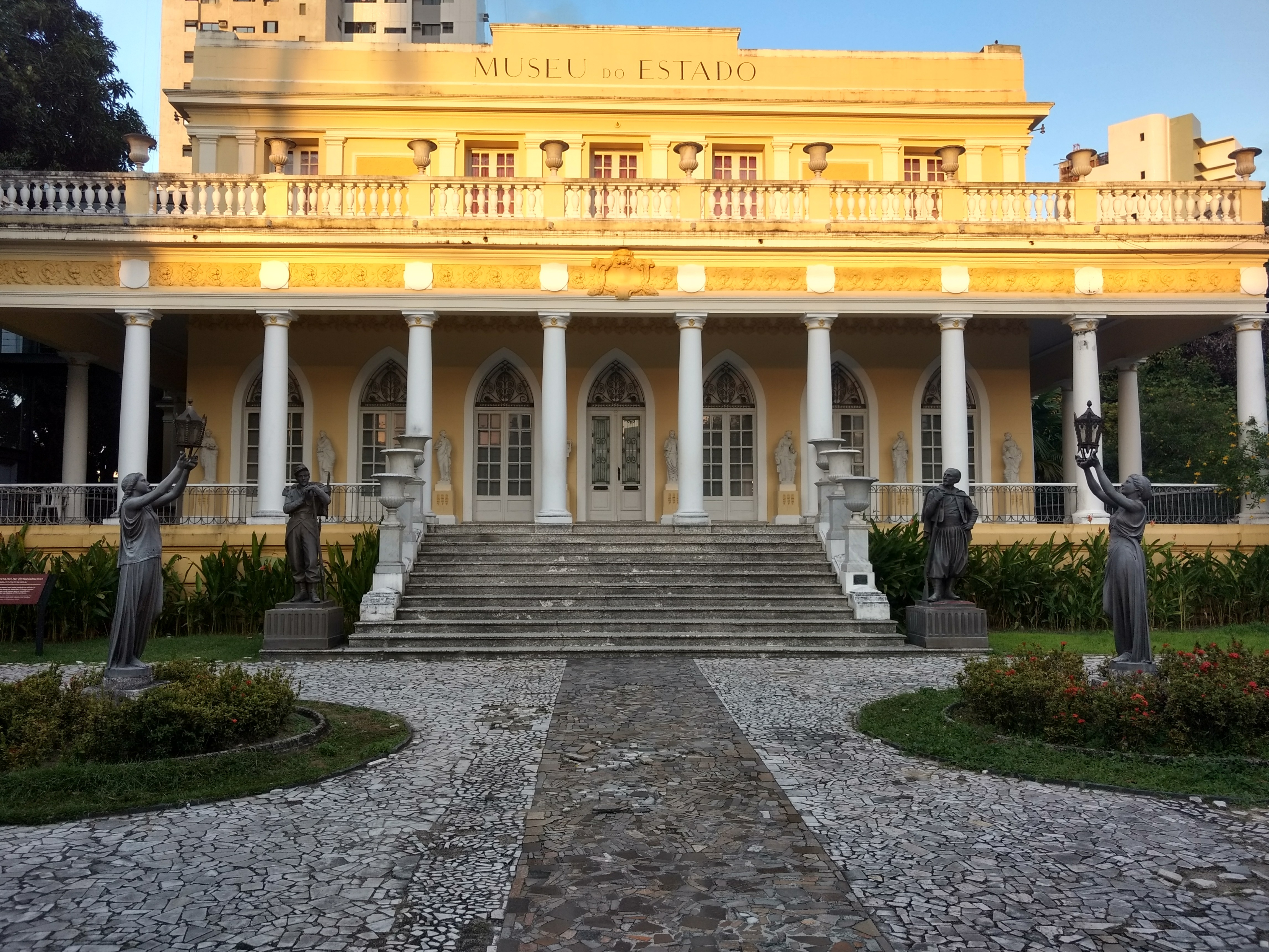 Museu do Estado de Pernambuco, Recife, Brasil. Cultural property Museu do Estado de Pernambuco, Recife, Pernambuco, Brazil Q6940628, VIAF ID: 144298795, Library of Congress authority ID: n84149774, P727: iPatrimônio ID: recife-museu-do-estado-de-pernambuco, Itaú Cultural ID: instituicao209579/museu-do-estado-de-pernambuco-mepe